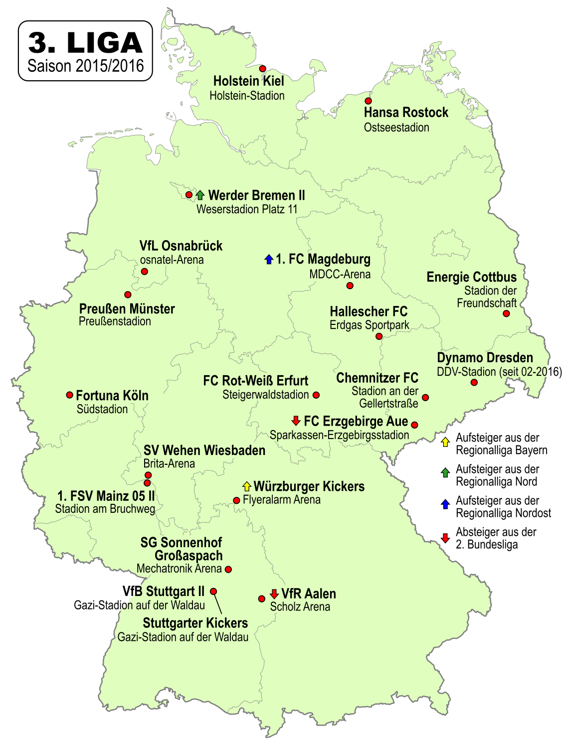 Karte der Vereine der 3. Fussball-Liga 2015/2016